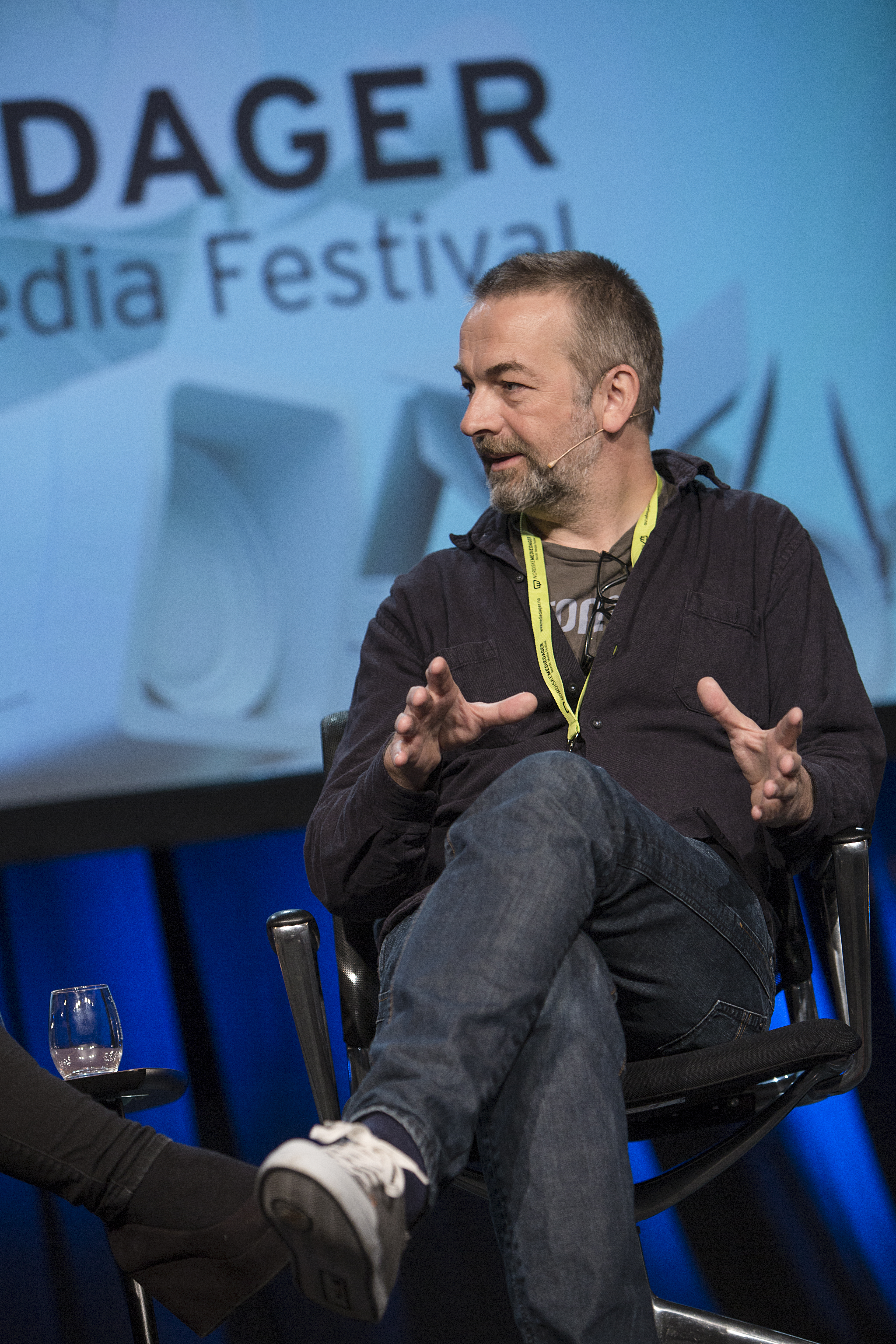 Medvirkende: Erlend Loe, Bjørn Olaf Johannessen, Greg Poehler, Per Schreiner Moderator: Mona B. Riise